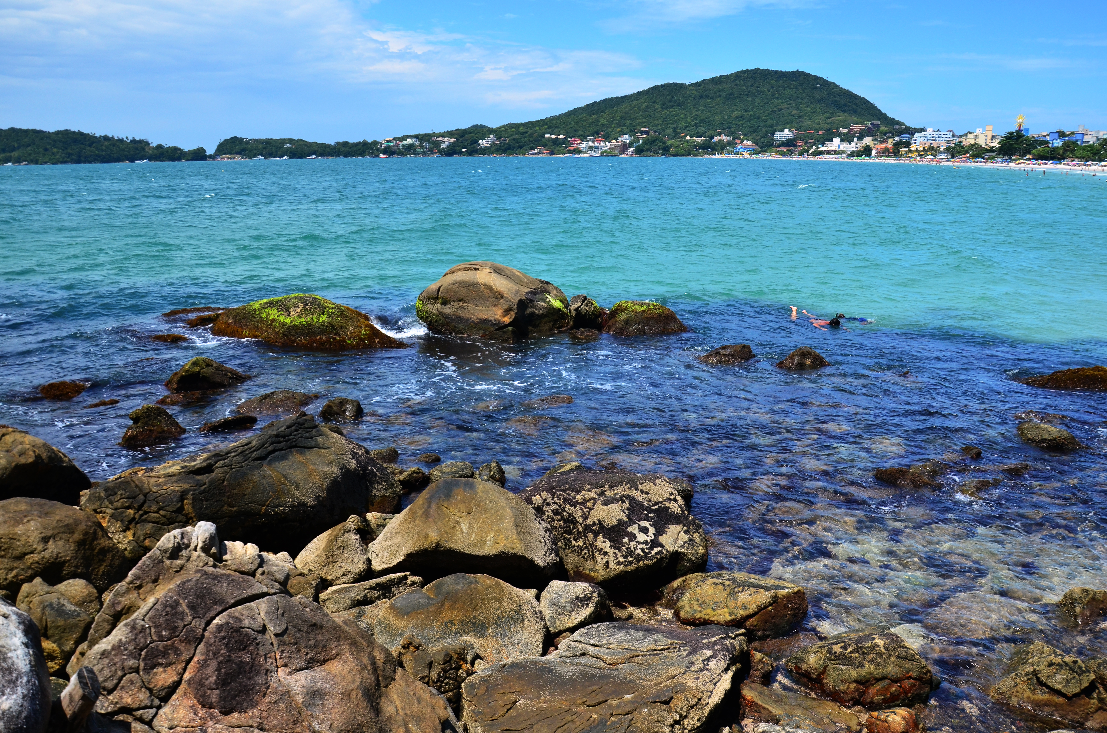 Praia de Bombinhas em dia ensolarado. Foto tirada da ponta esquerda da praia.